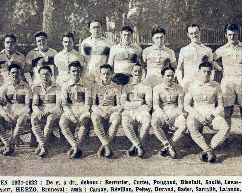 Club athlétique des sports généraux (C.A.S.G.) rugby à XV, en 1921-22